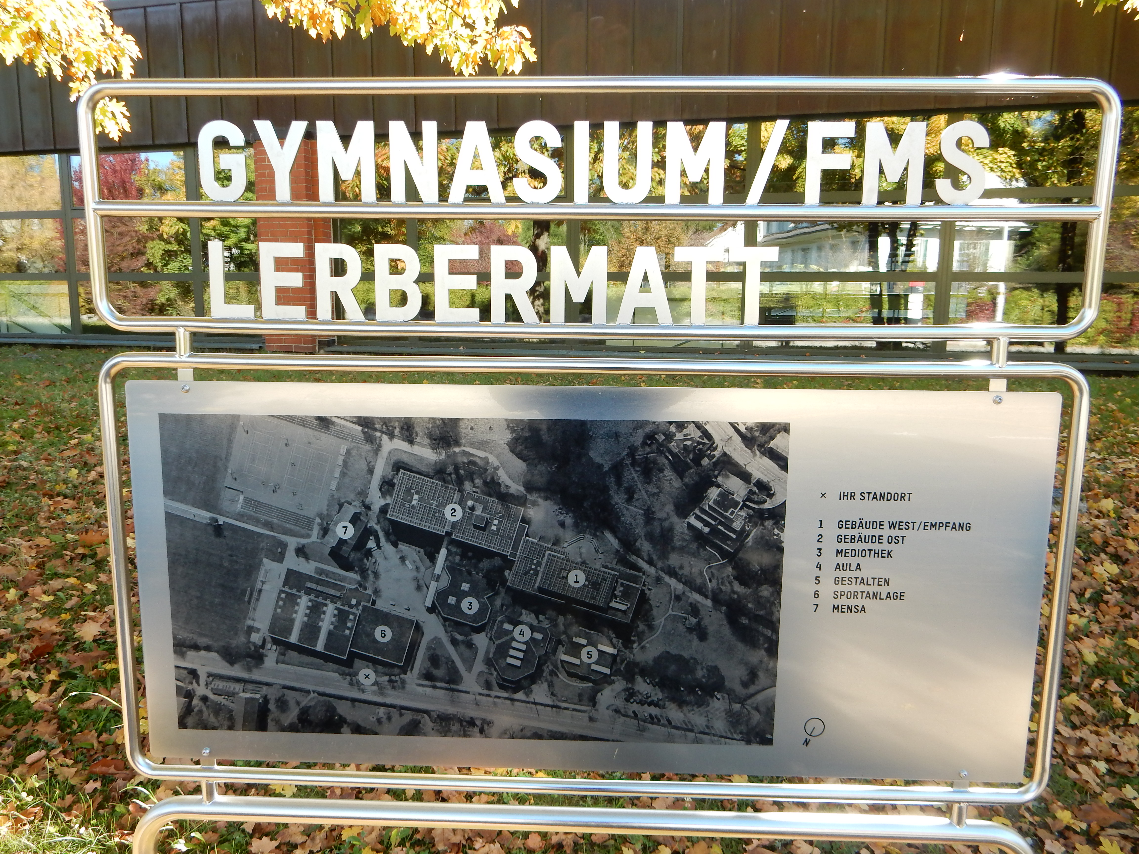 Gymnasium Lerbermatt (Köniz/Schweiz): Informationstafel